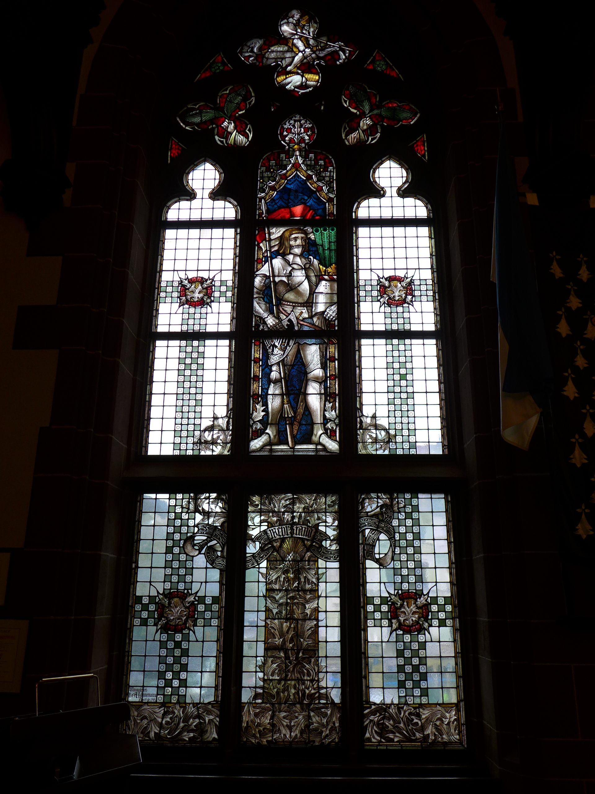 Rathaus St. Johann, Festsaal, Glasgemälde "Wehrstand"